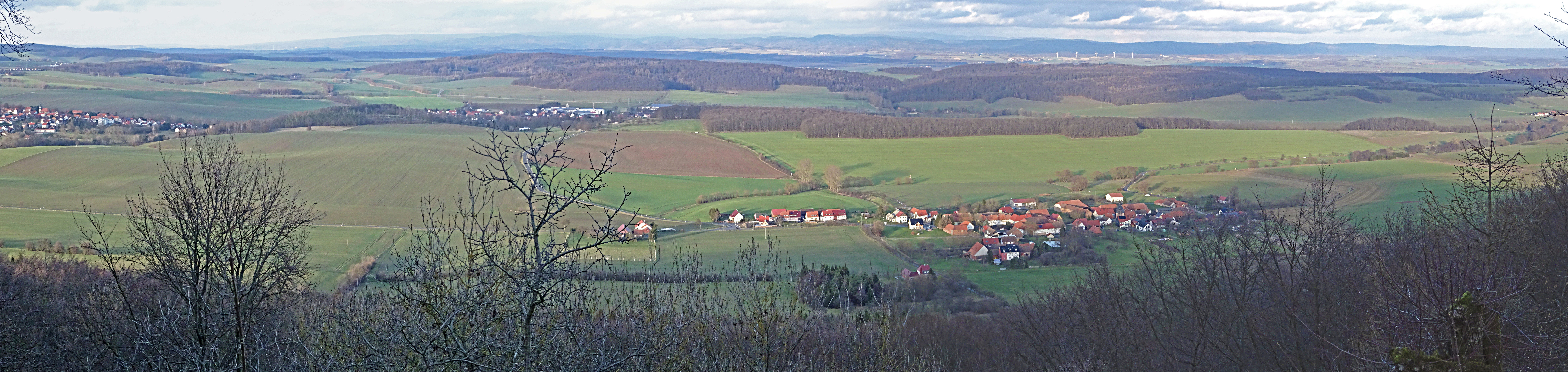 Hasenburg (Eichsfeld), Aussicht von den Klippen am Ochsensprung nach Norden